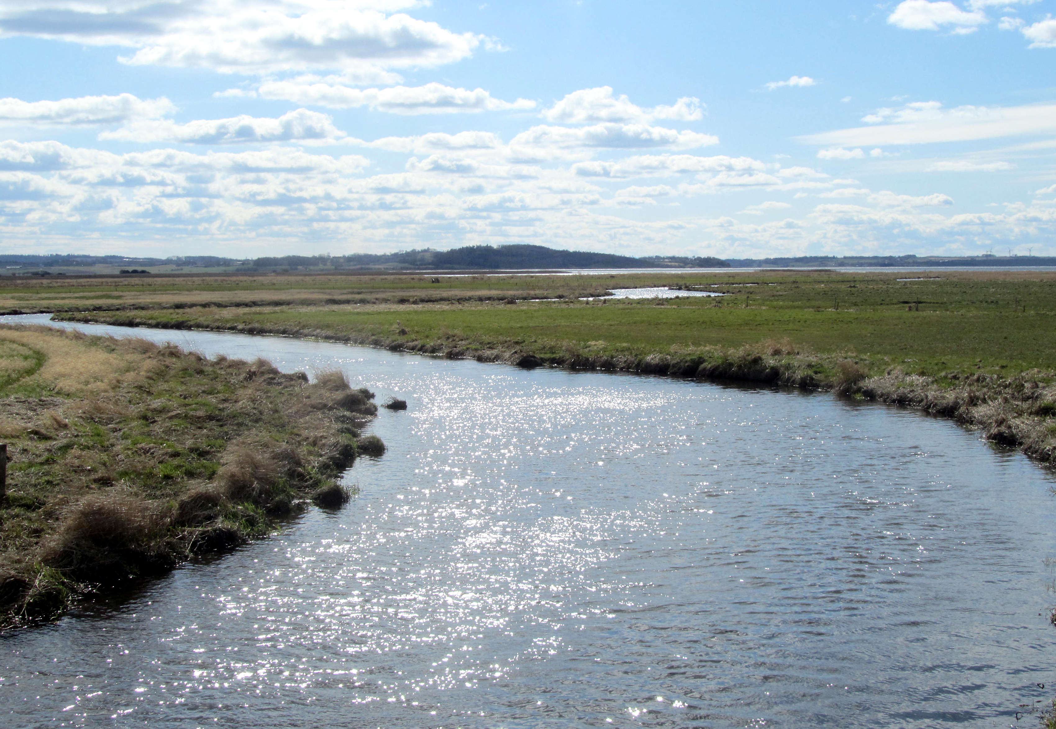 Simested Å med Hjarbæk Fjord i baggrunden